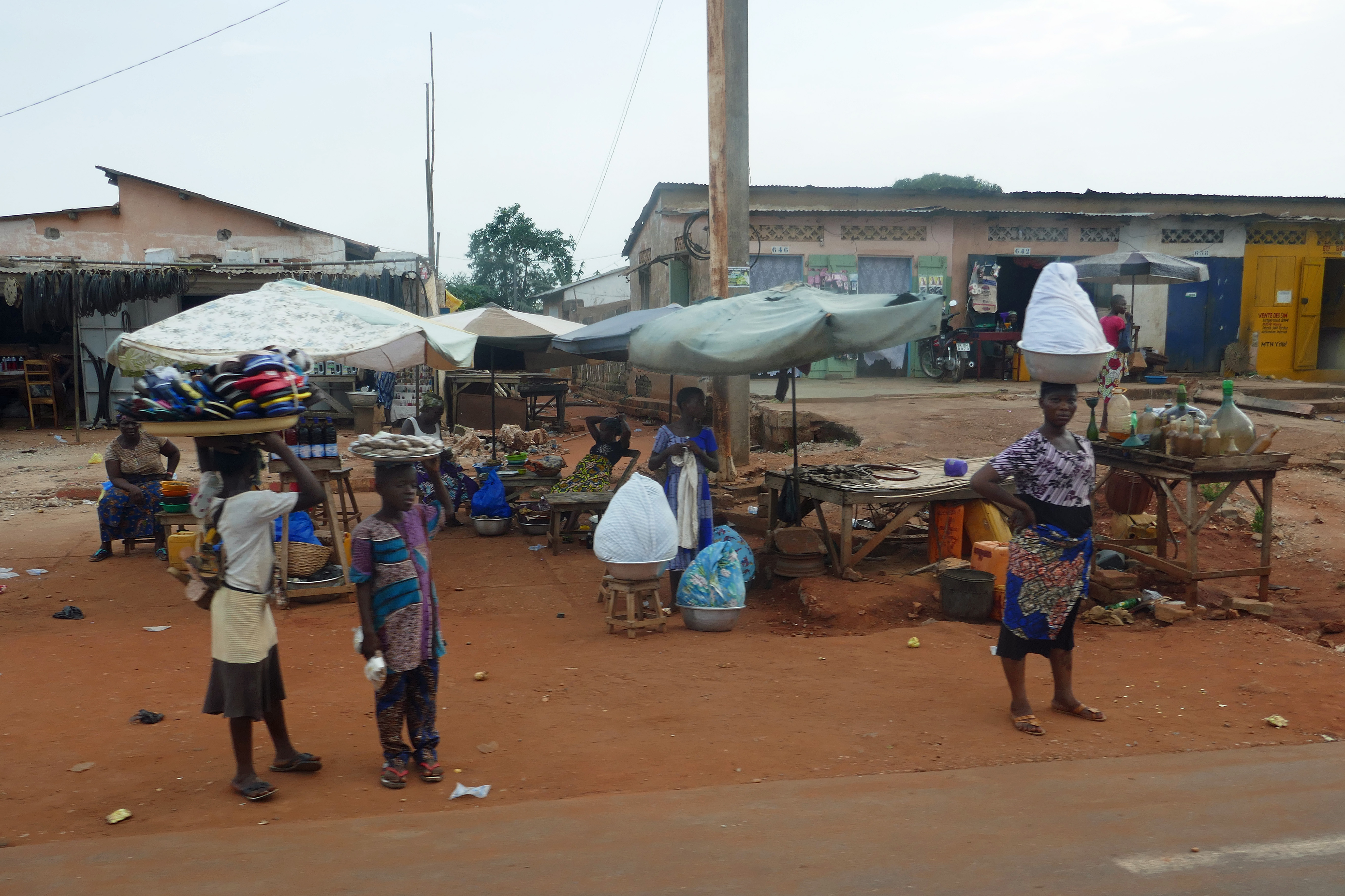 Scène de rue à Comè (Mono, Bénin).